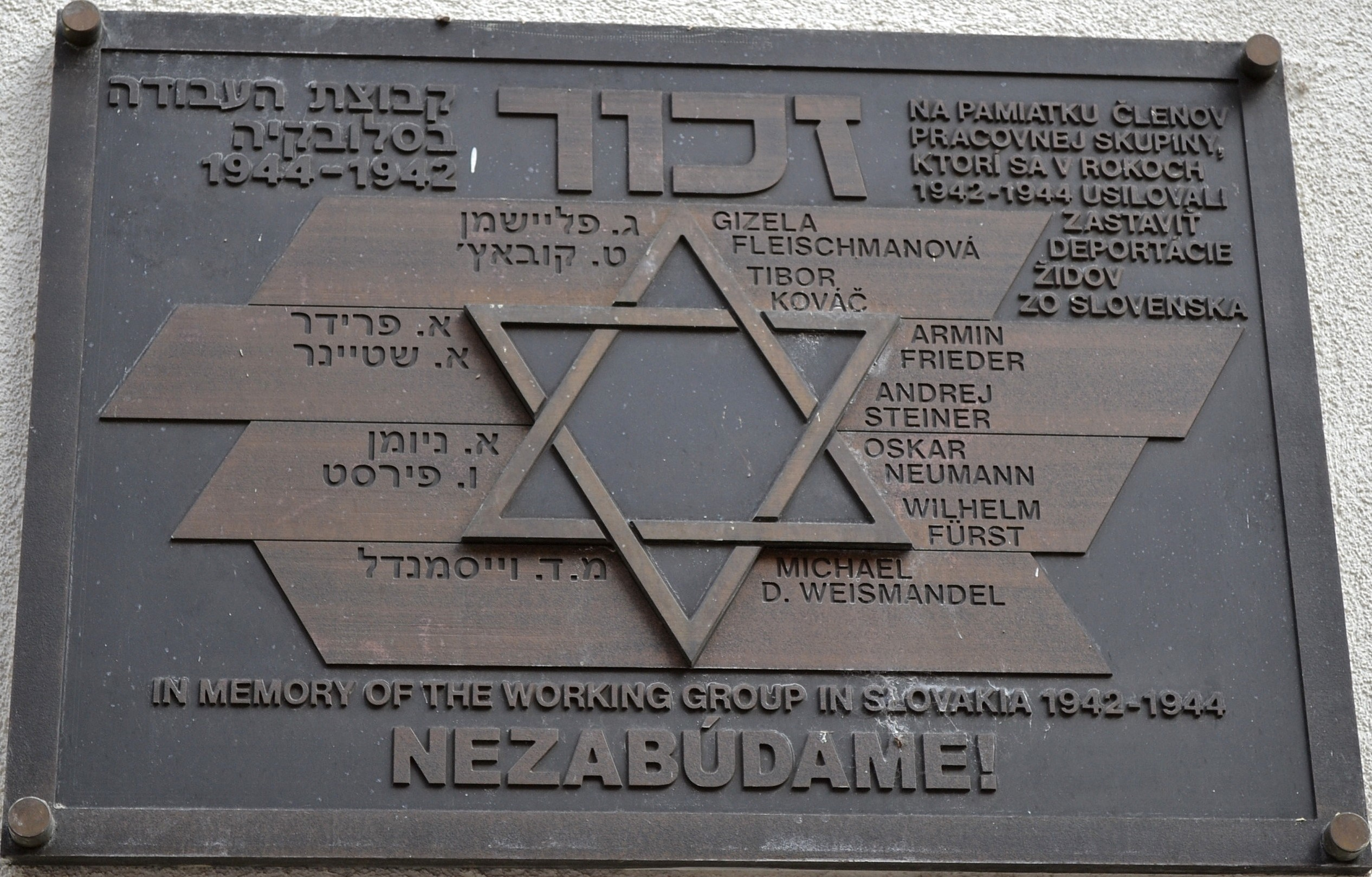 Kozia ul. č. 18. Pamätná tabuľa na fasáde